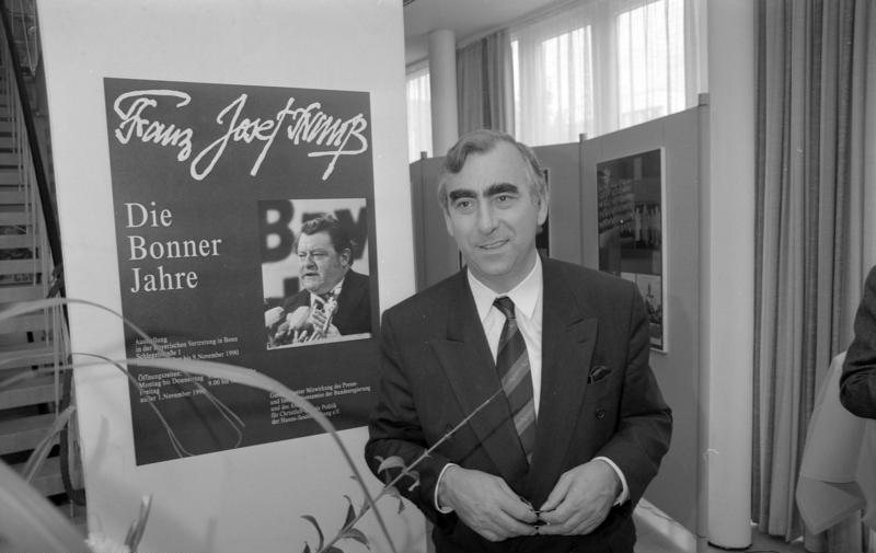 10. Oktober 1990 Die bayerische Landesvertretung in Bonn eröffnete am 10. Oktober 1990 aus Anlaß des 2. Todestages (3. Oktober 1988) von Franz Josef Strauß eine Ausstellung, die mit Fotos und Exponaten das politische Leben von Franz Josef Strauß würdigen. Diese Ausstellung fand statt unter Mitwirkung der Bildstelle des Presse- und Informationsamtes der Bundesregierung und des Archivs für Christlich-Soziale Politik der Hanns-Seidel-Stiftung e.V.